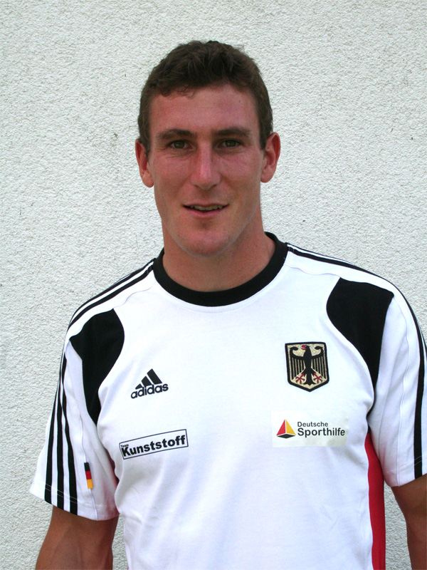 Sebastian Brendel - Deutscher Kanu-Rennsportler - hauptsächlich aktiv im Einer-Canadier